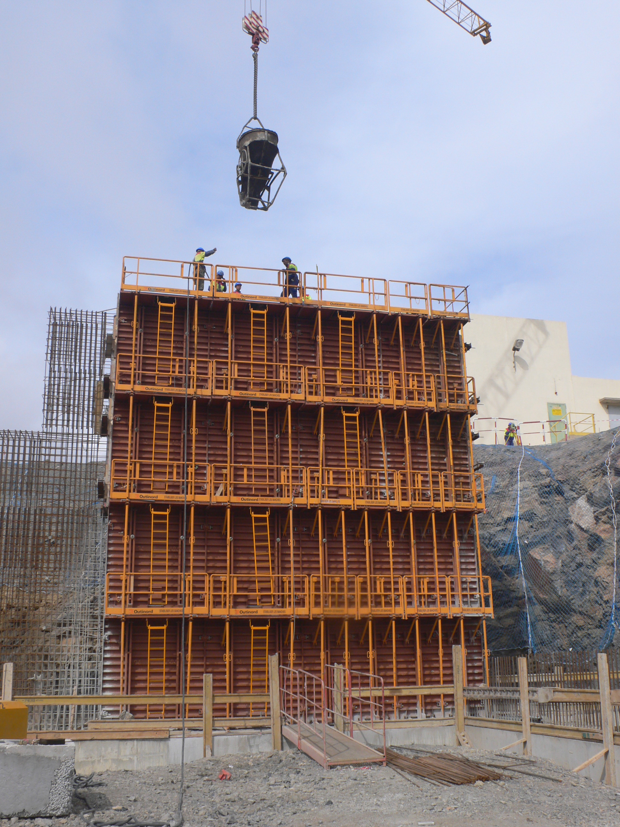 Coffrage d'un voile à l'aide de banches B8000 Outinord